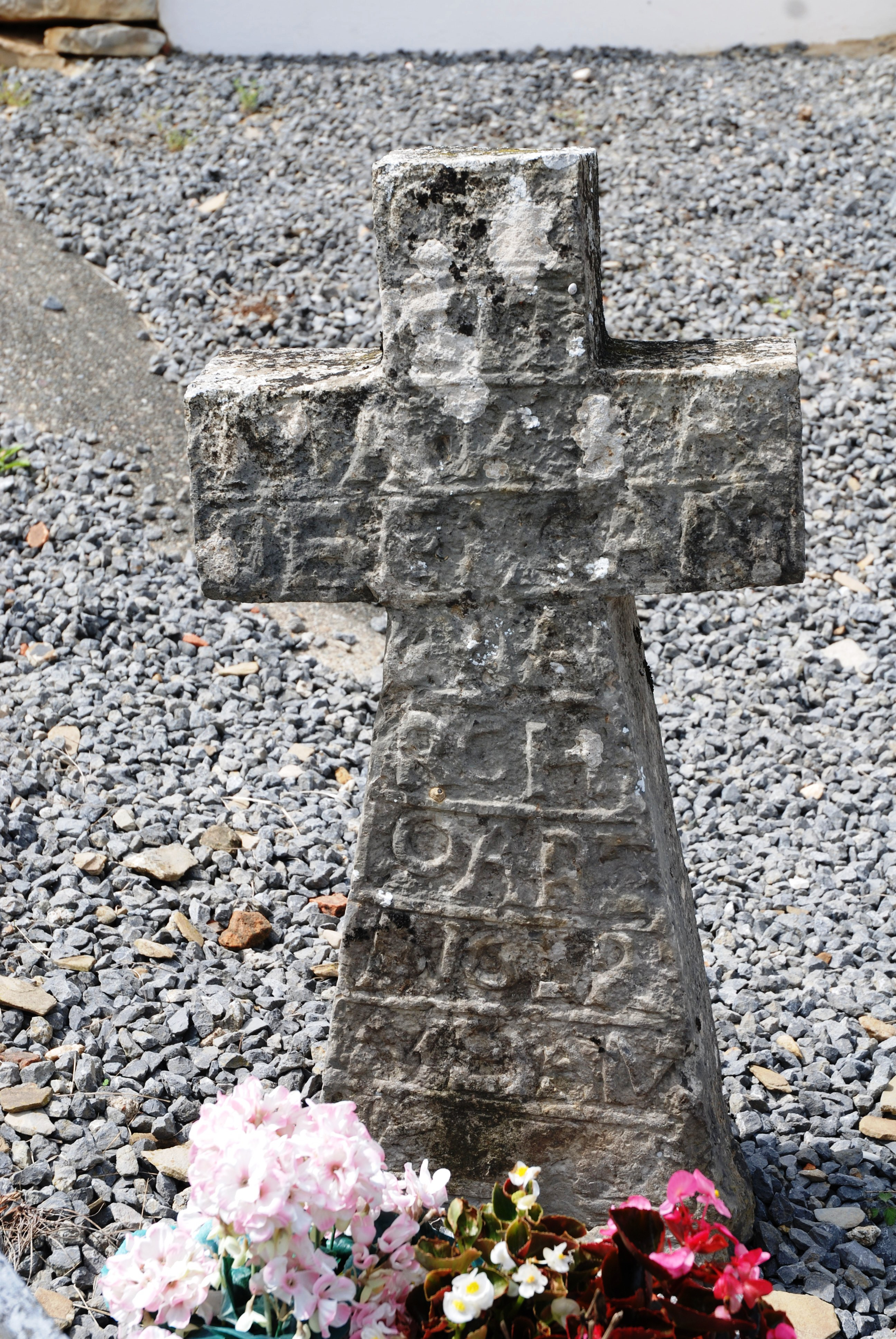 Stèle à Arhansus